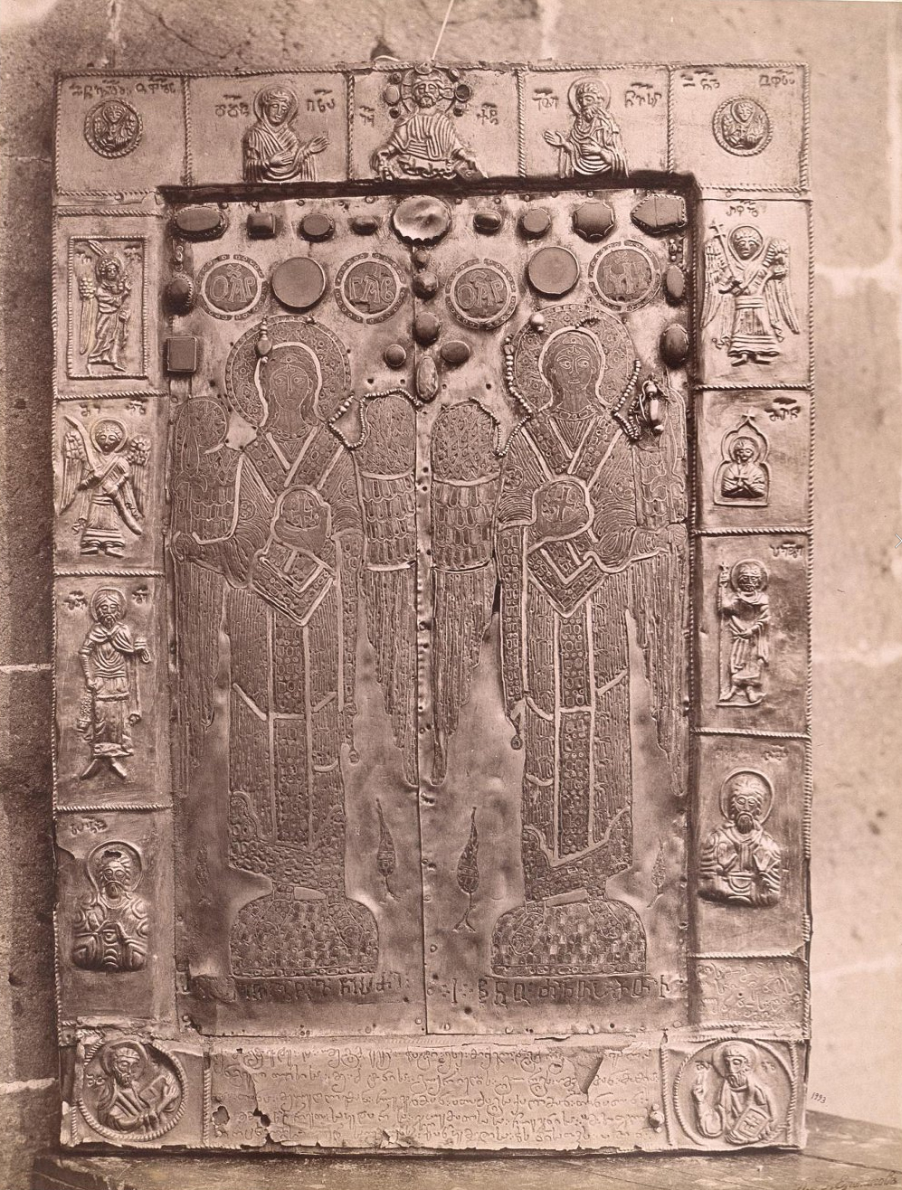 ტვიფრული მინანქრის მთავარანგელოზთა ხატი ჯუმათიდან